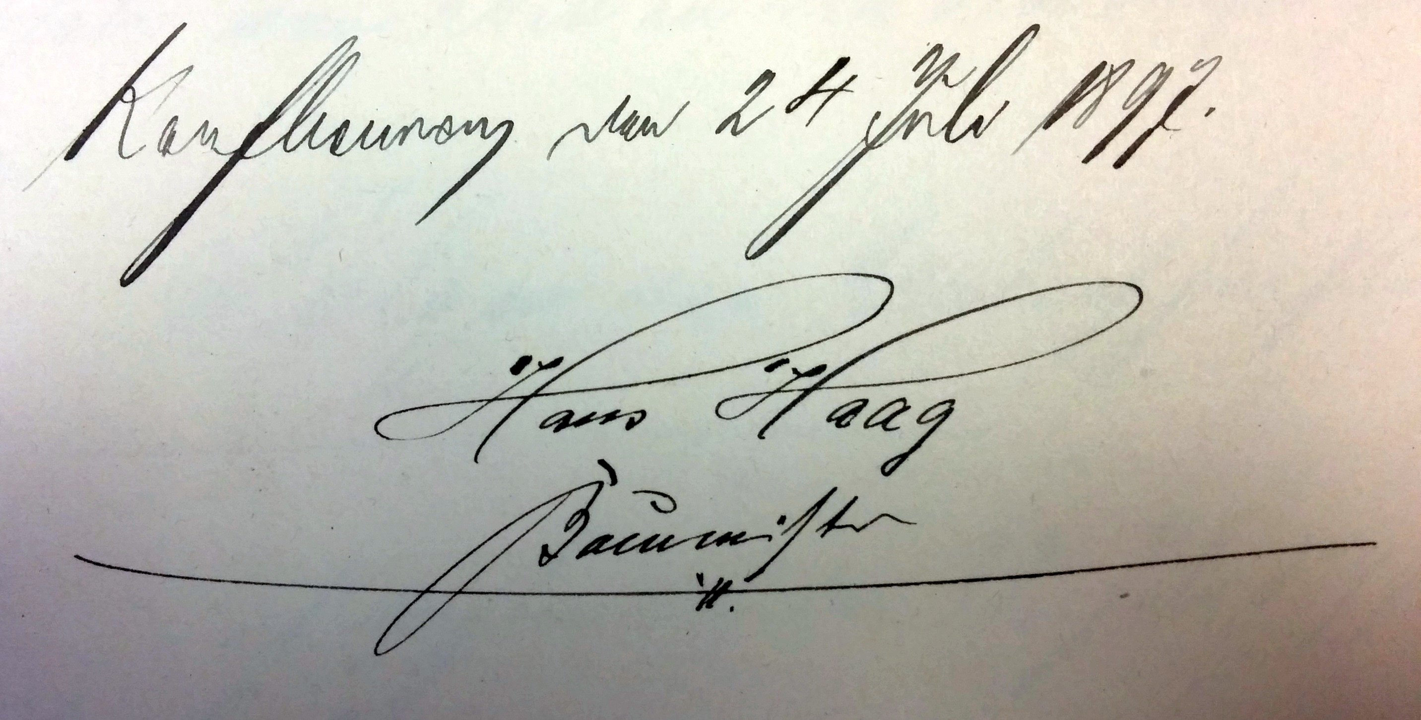 Signatur von Johannes (Hans) Haag auf einem Brief an den Stadtmagistrat Kaufbeuren